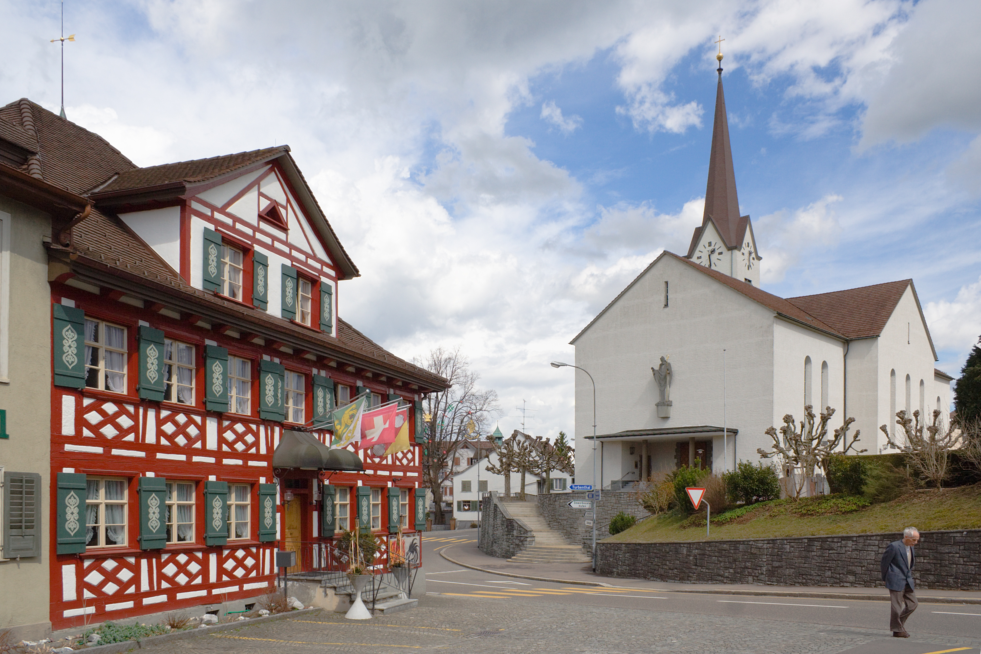 römisch-katholische Kirche im Dorfzentrum von Sirnach, Schweiz. Links im Bild das Restaurant Engel.